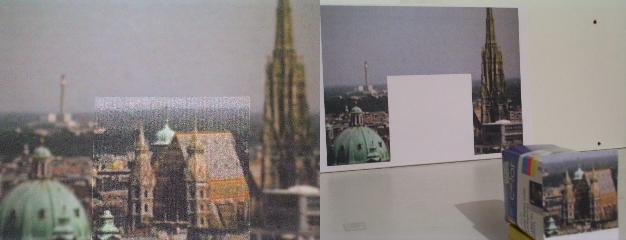 Die Übertragung des Hintergrund-Bildes auf die Vorderseite eines Gegenstandes führt zu seiner Unsichtbarkeit.